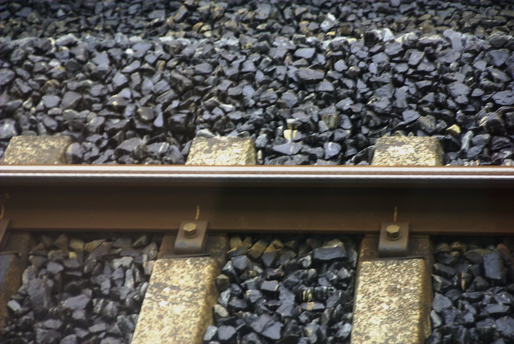 Shinkansen Track